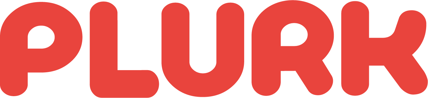 Plurk Logo